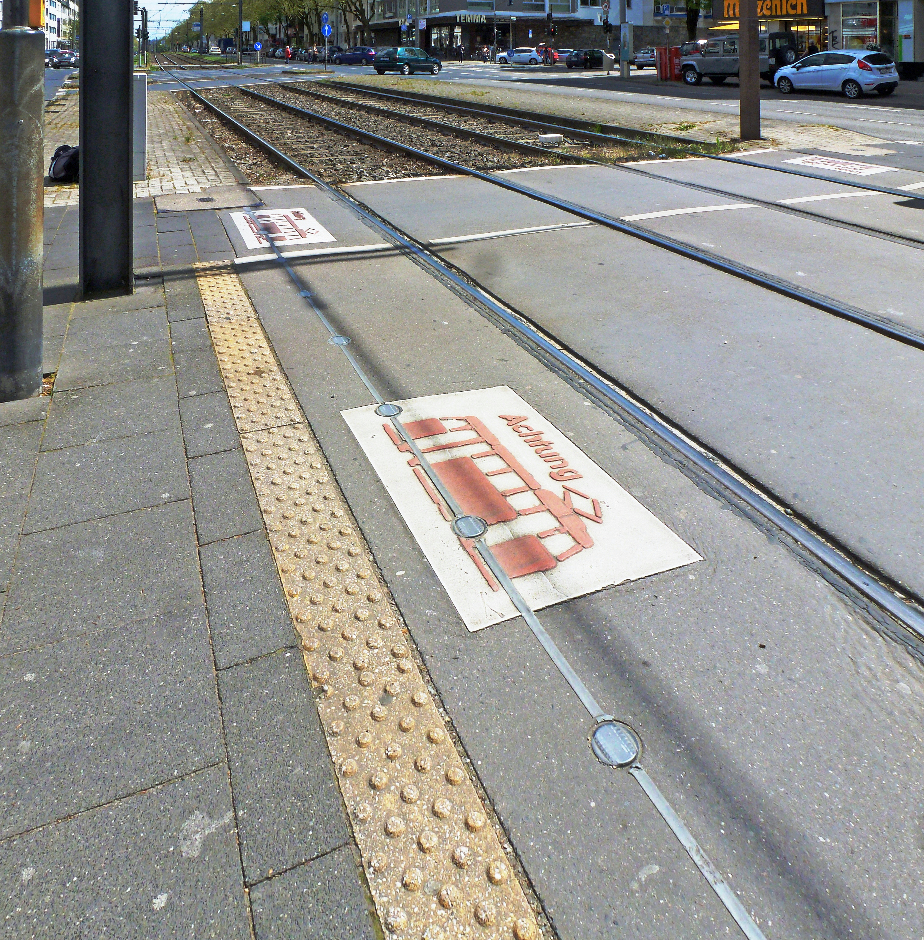 Bodenampeln am Fußgängerüberweg Aachener Straße/Maarweg